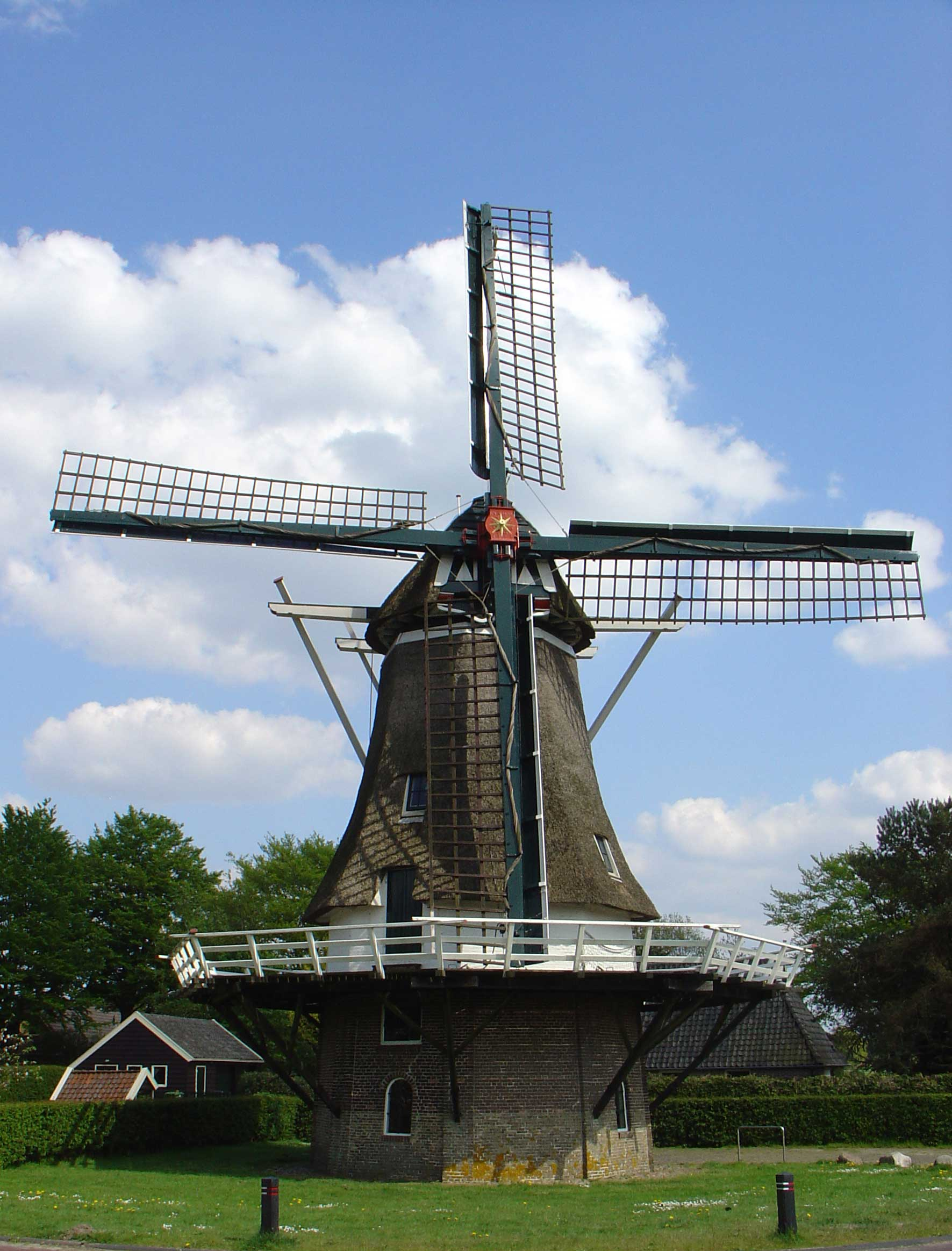 molen de Vlijt in Diever